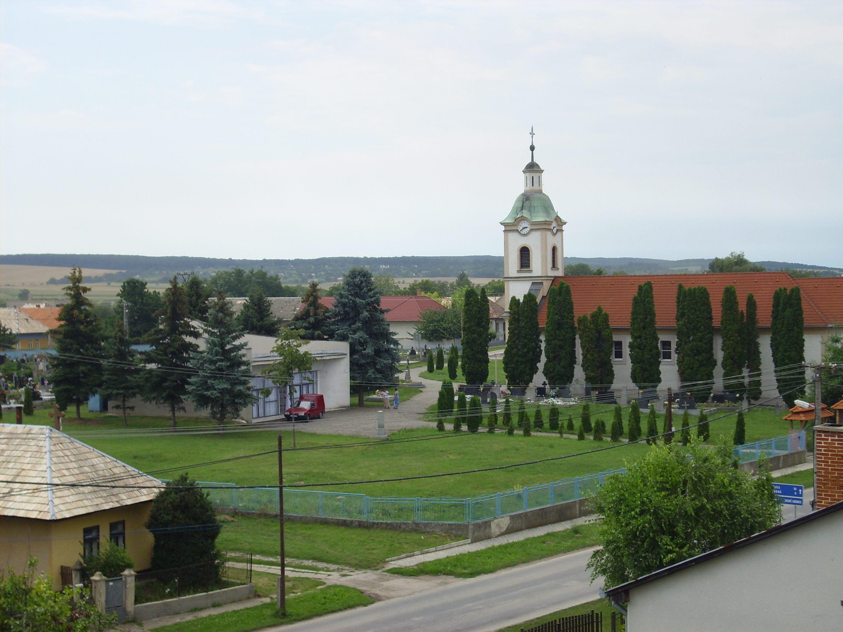 Kostel v Kuraľanech, okres Levice, Slovensko